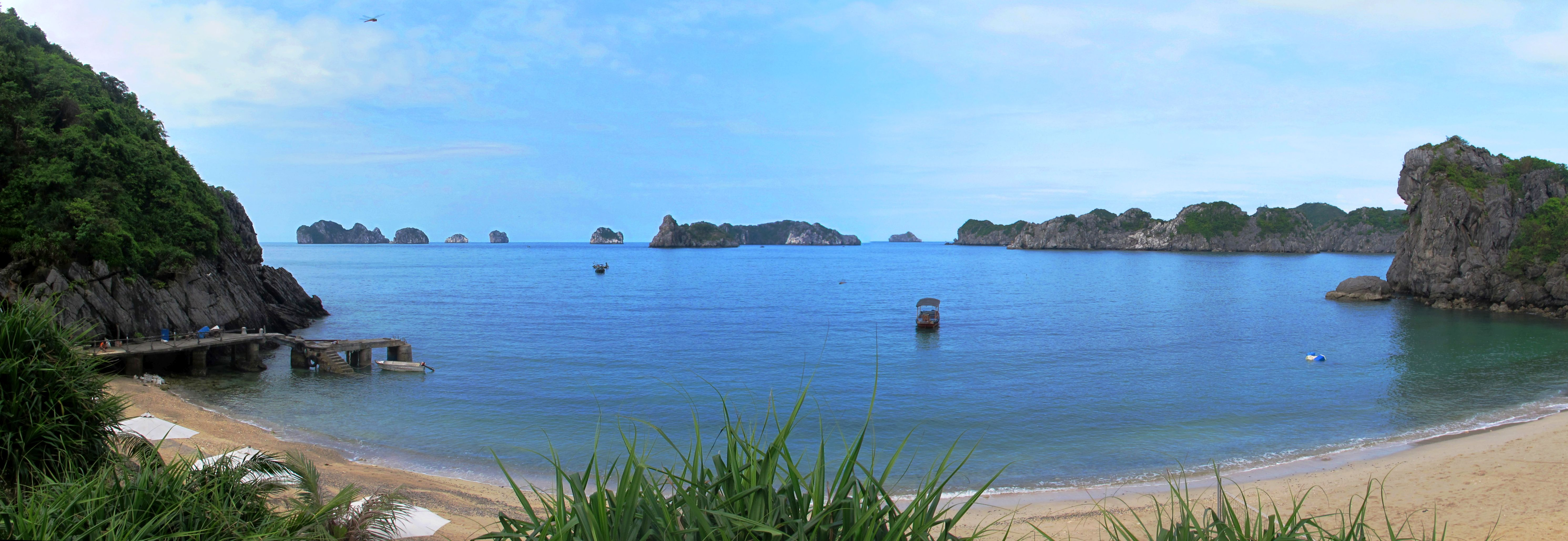 Halong Bay panorama picture taken from monkey island